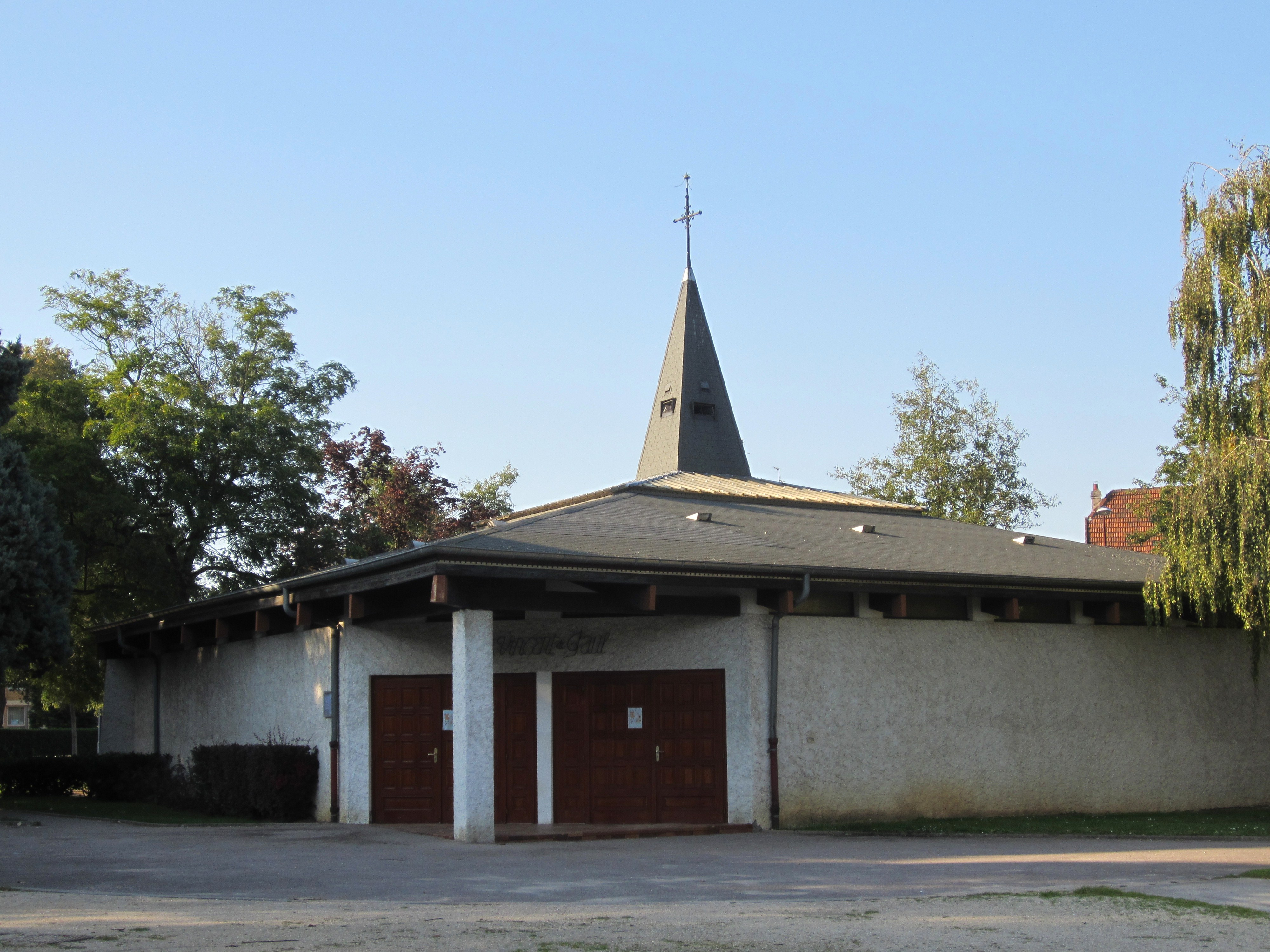 Metz Eglise saint vincent de paul au Sablon